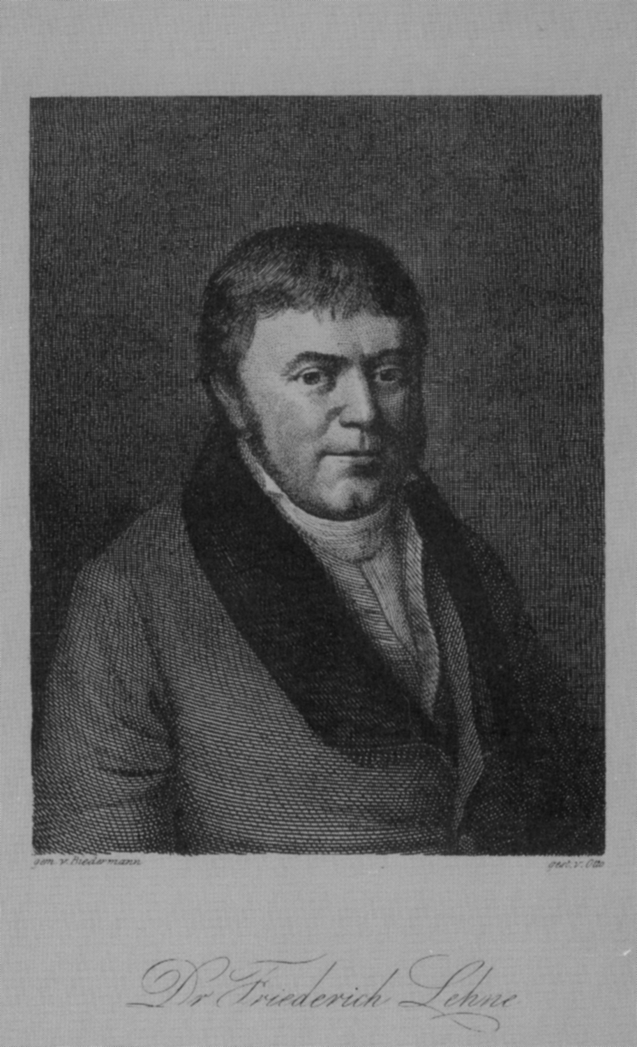 Prof. Friedrich Lehne: Mainzer Jakobiner, Schriftsteller, Bibliothekar und Geschichtsforscher